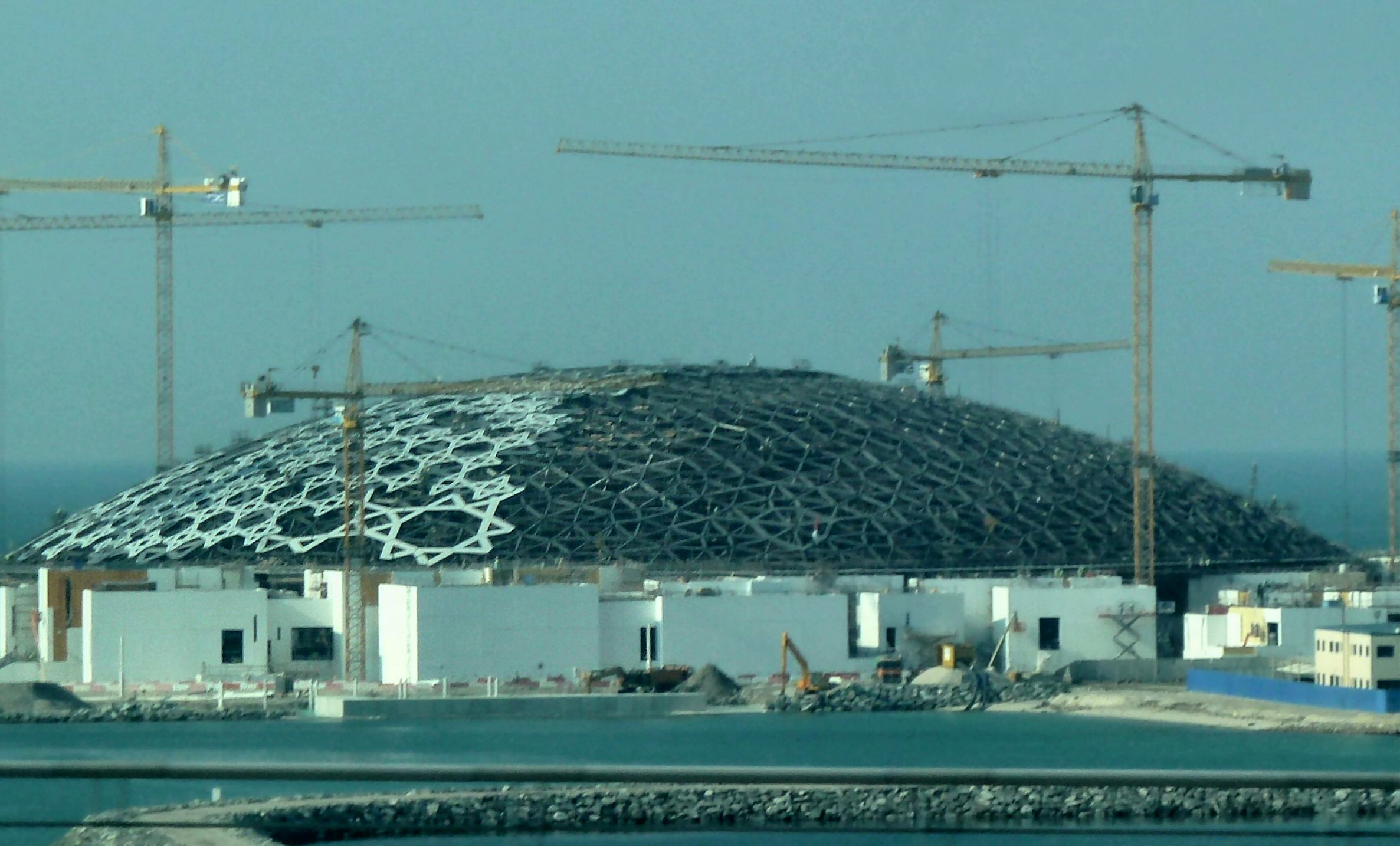 Abu Dhabi - Saadiyat Iceland - Louvre Abu Dhabi under construction --- السعديات أيسلندا - متحف اللوفر أبو ظبي تحت الإنشاء